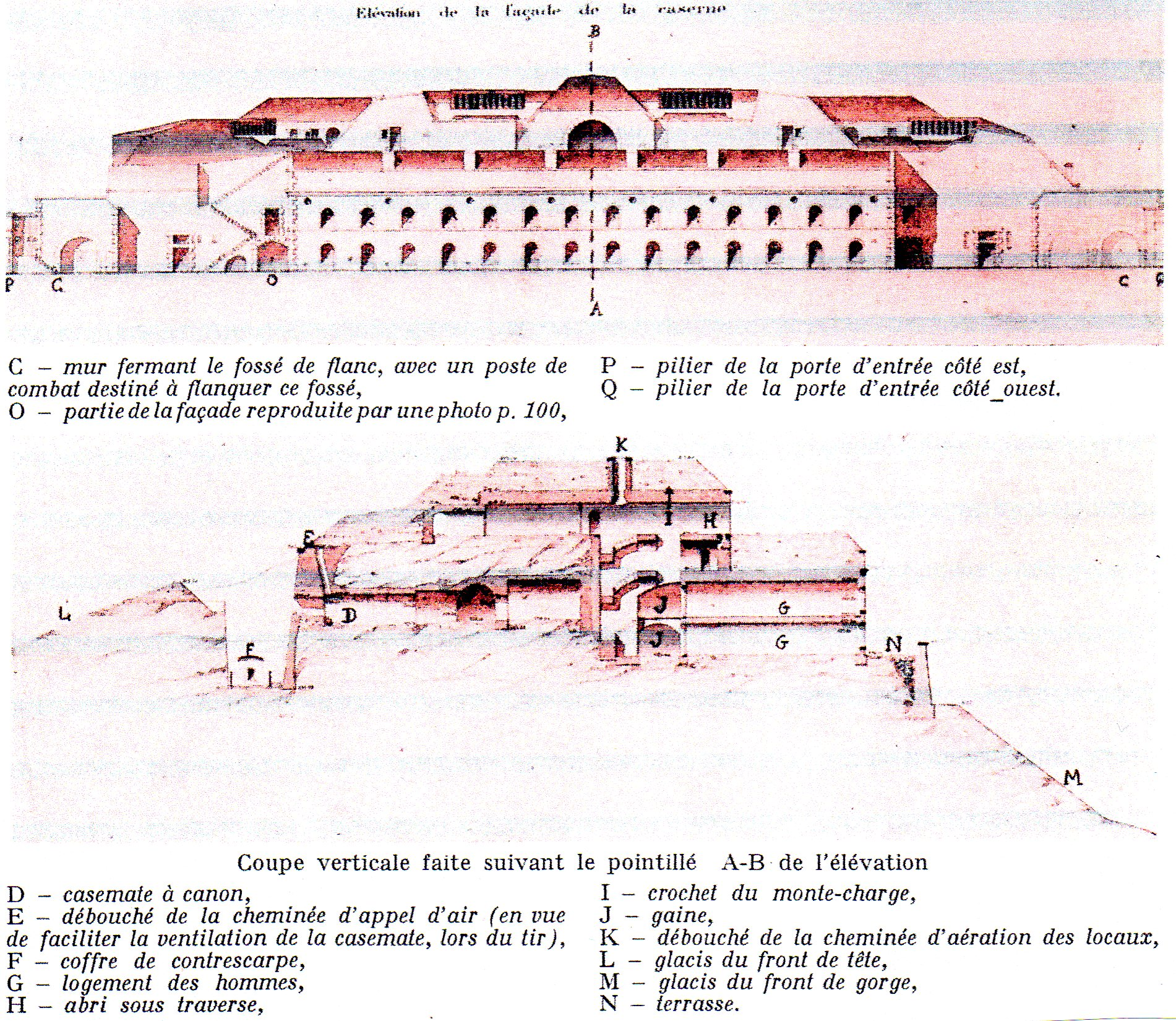 Plan montrant la face arrière et l'intérieur